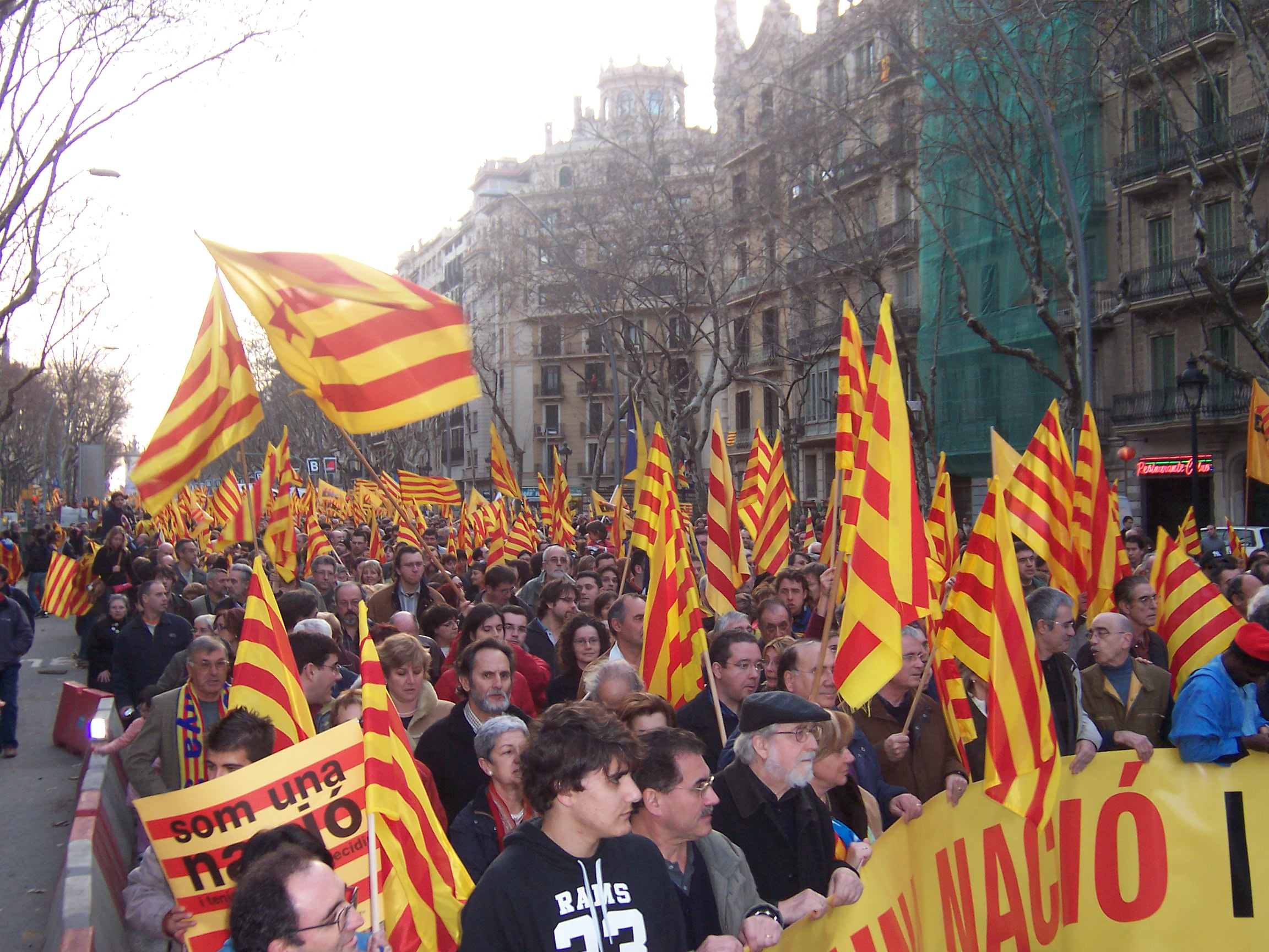 Manifestació "" Fotografía feta per Sergi Larripa, el 18 de febrer de 2010 a DRASE(Barcelona).